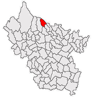 Categorie:Hărţi ale judeţului Buzău